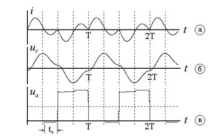 Часові даграми для напівмостової схеми резонансного інвентора зі зворотніми діодами